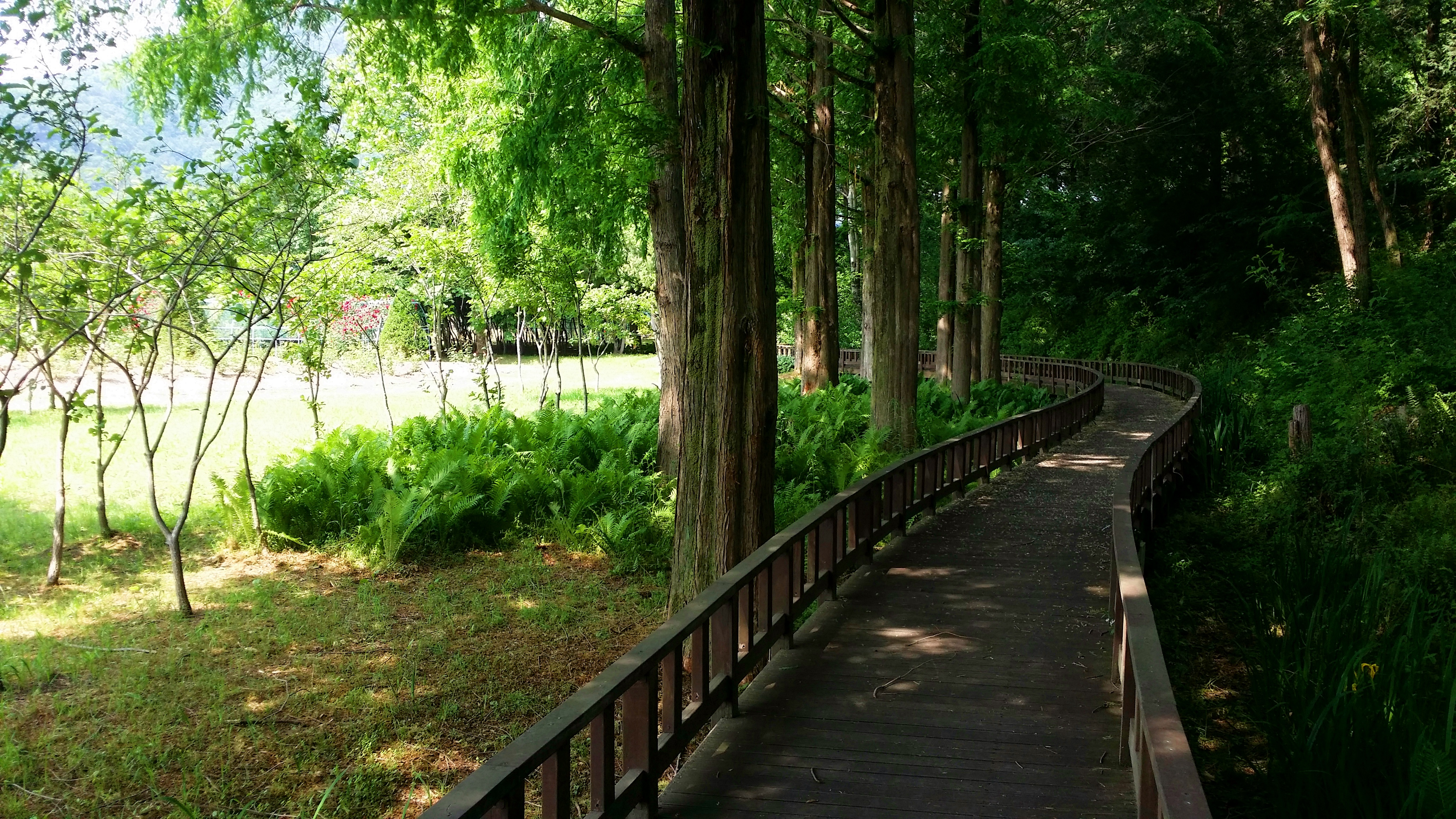 대청호오백리길 21구간_5